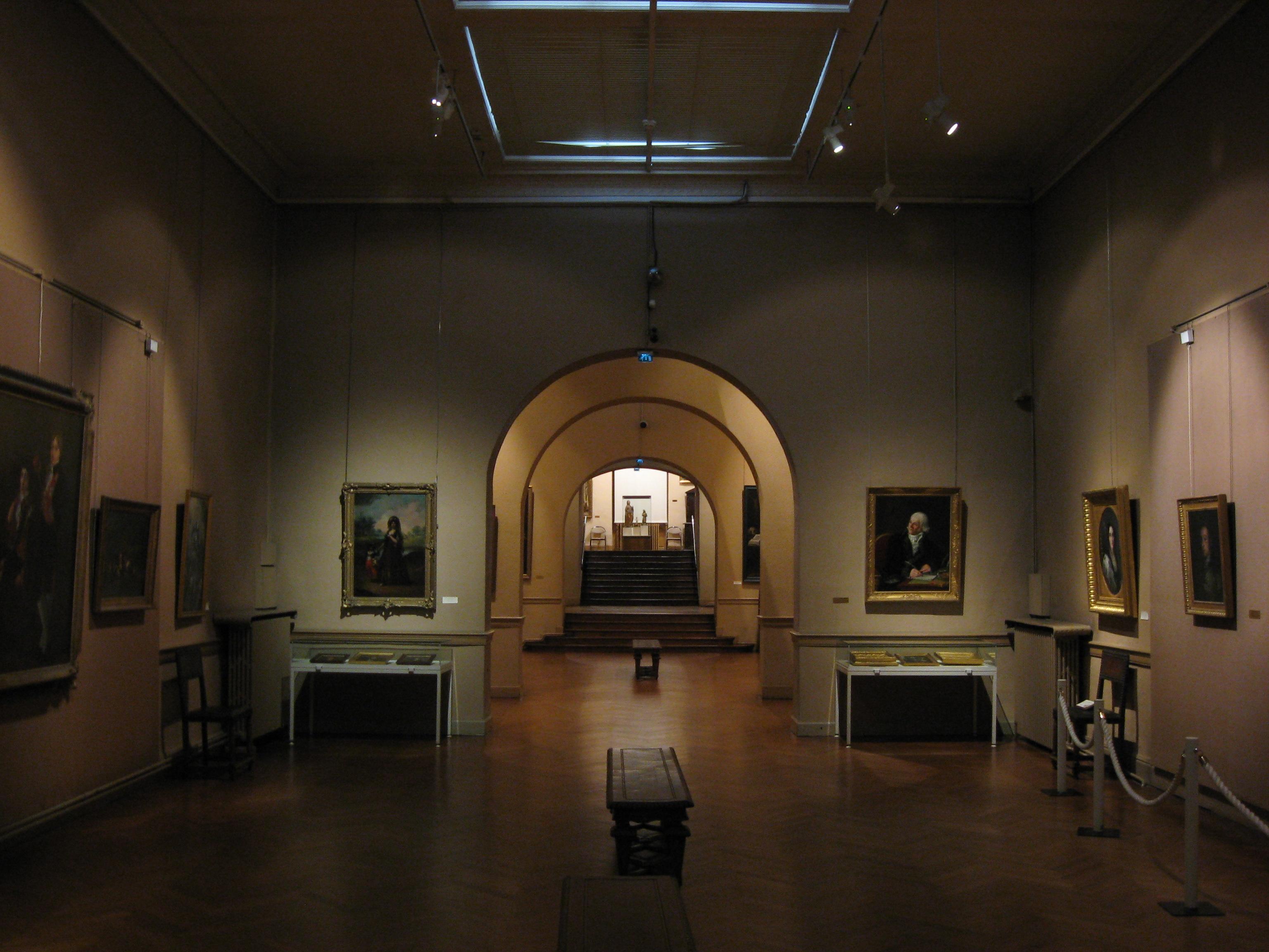 Musée Goya in Castres